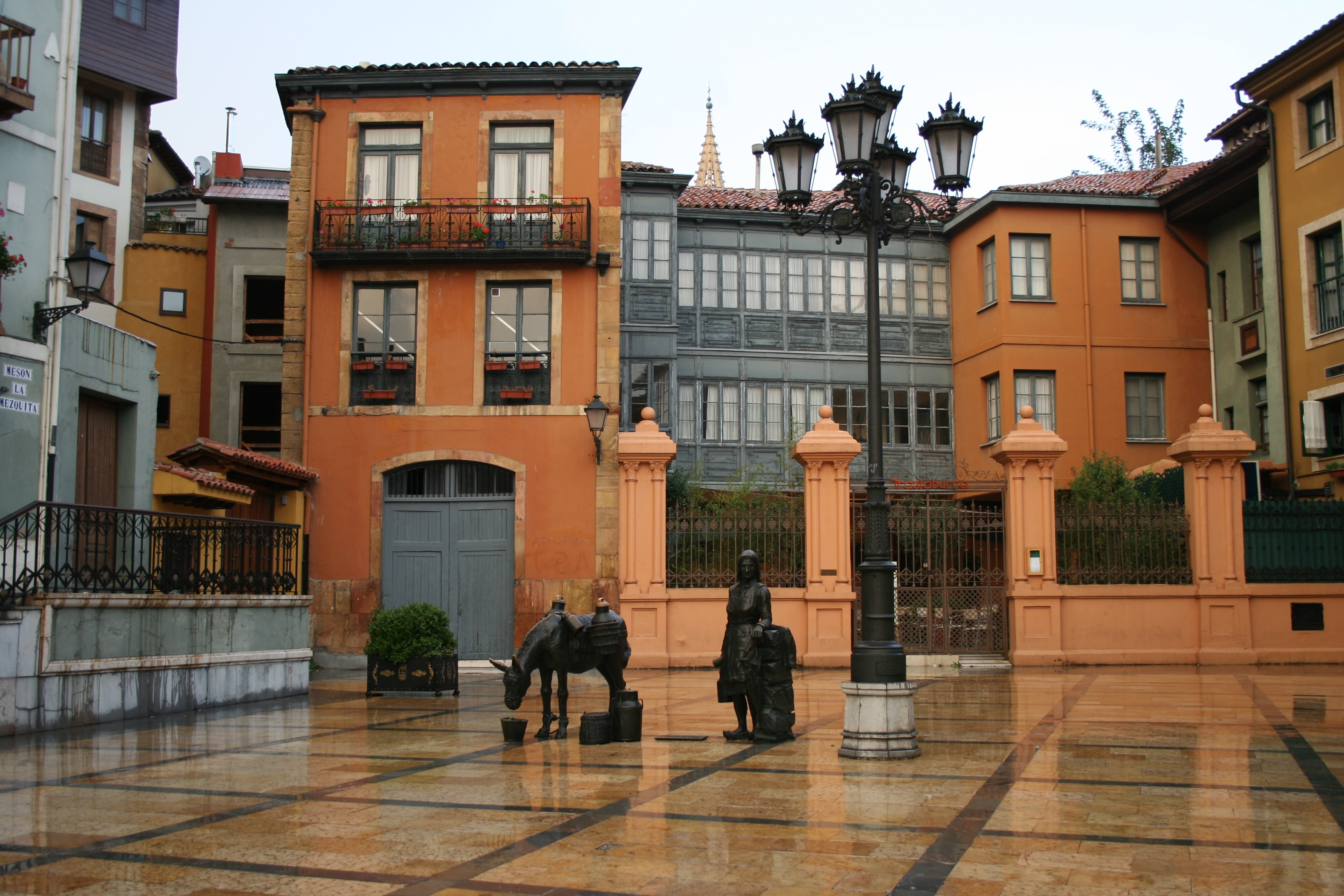 Estatua dedicada a la aldeana vendiendo leche por Oviedo